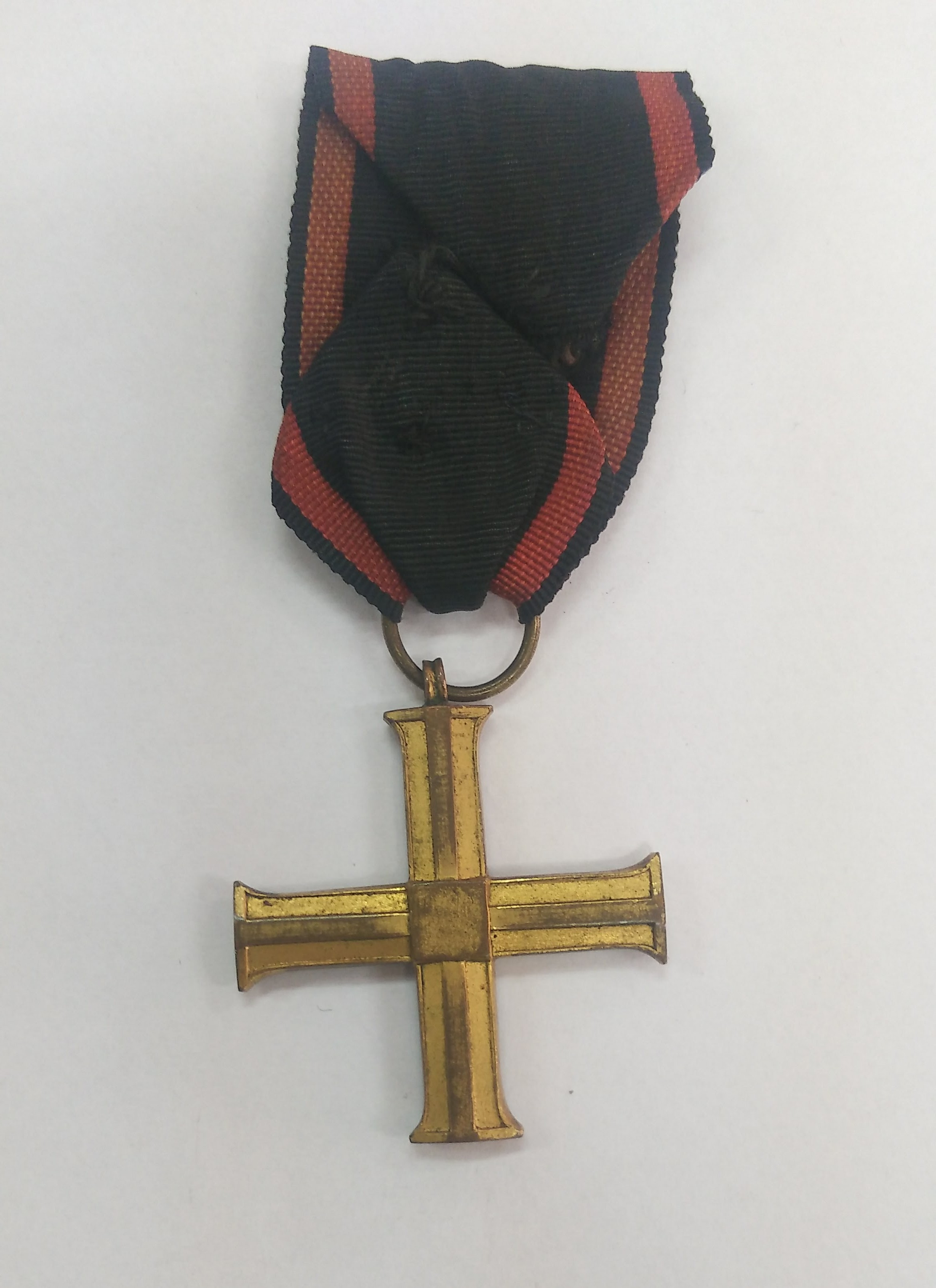 Rewers Krzyża Niepodległości